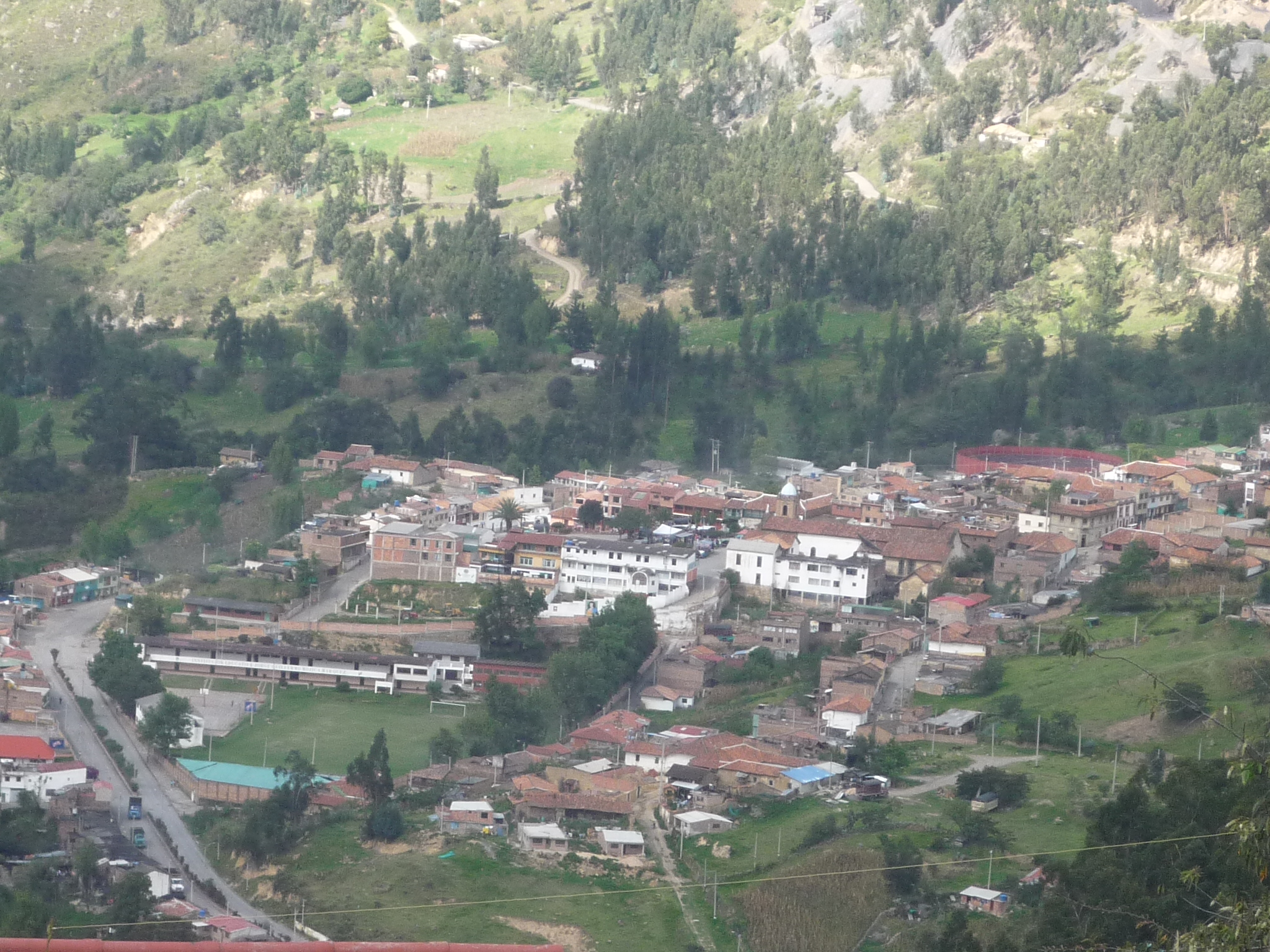 Vista panorámica del Área urbana del Municipio de Tasco.